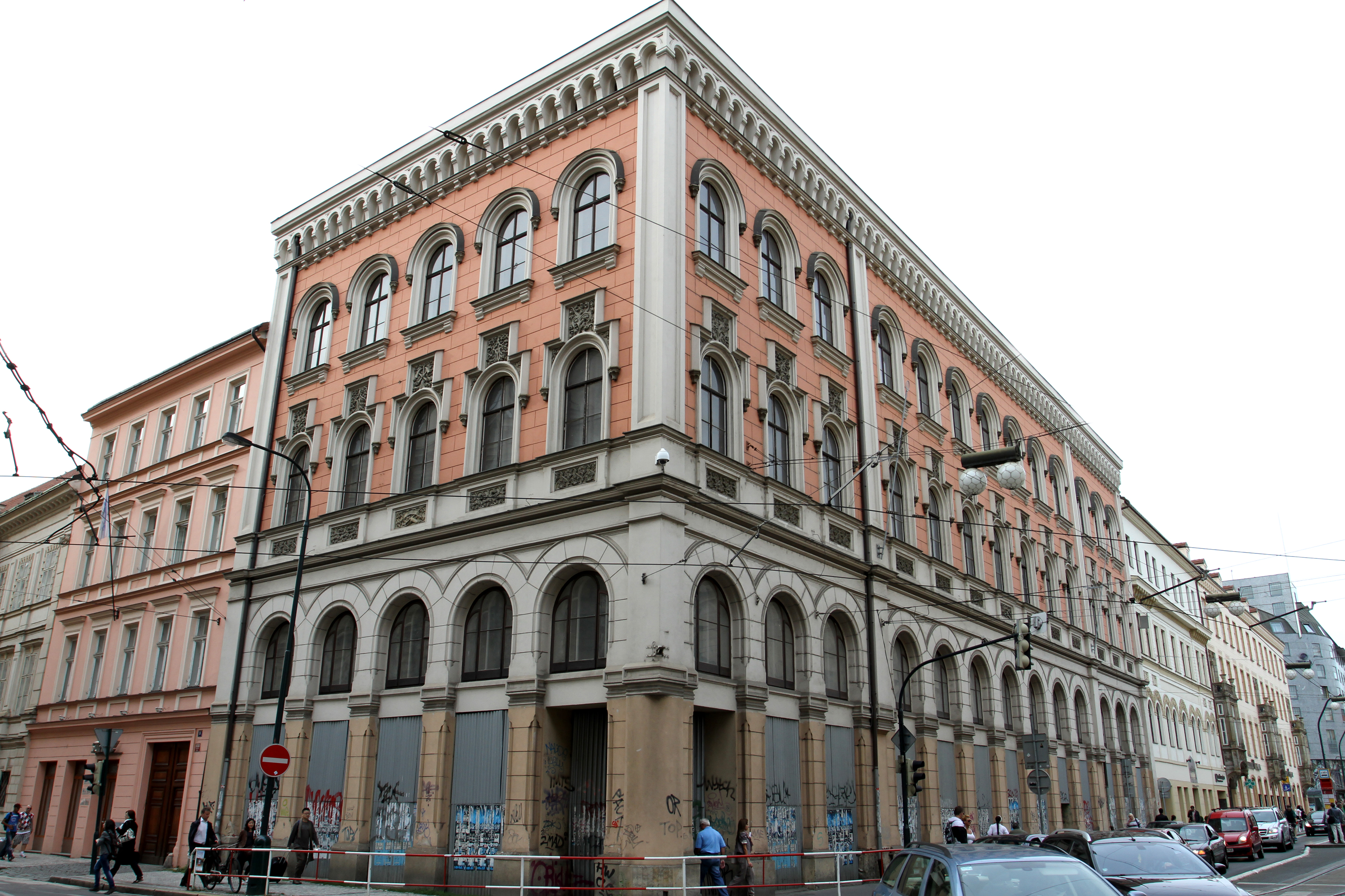 Palác Lannův (Nové Město), Praha 1, Hybernská 1030/11, Nové Město